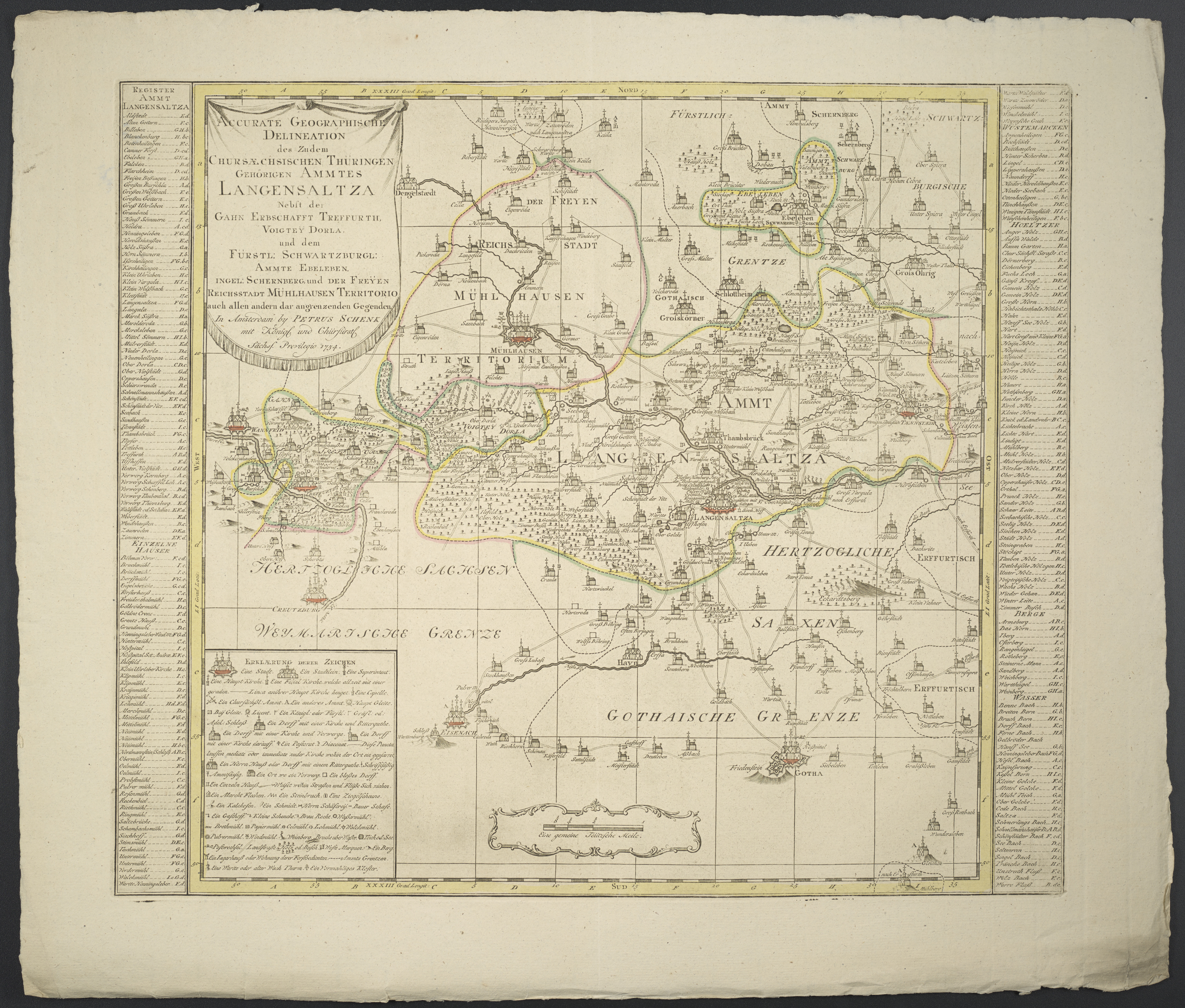 1 Kt. : Grenzen kolor. (47 x 47 cm); Koordinaten E 10°06'26"-E 10°51'52"/N 51°20'58"-N 50°51'52"; Maßstab in graph. Form (gemeine Teützsche Meile). - Titelkartusche oben links. - Maßstabskartusche unten Mitte. - Erkl. der Zeichen unten links. - Mit 1 Register der Orte, Wälder, Berge u. Gewässer auf d. Plattenrand. - Aus: Atlas Saxonicus Novus ; 35. - Mit Suchnetz. - Relief: Einzelberge